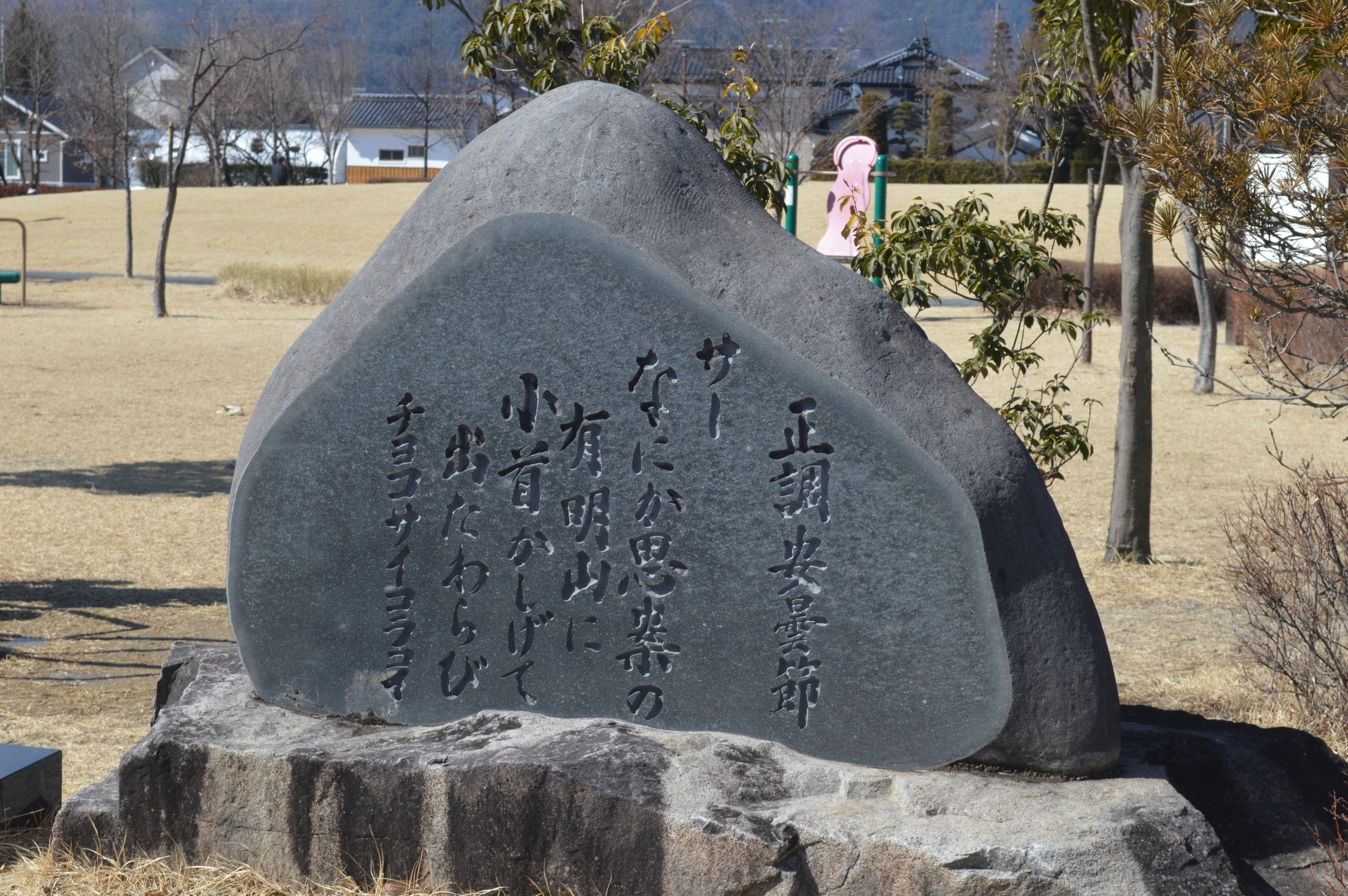 長野県北安曇郡松川村の松川中央公園にある安曇節の歌碑。